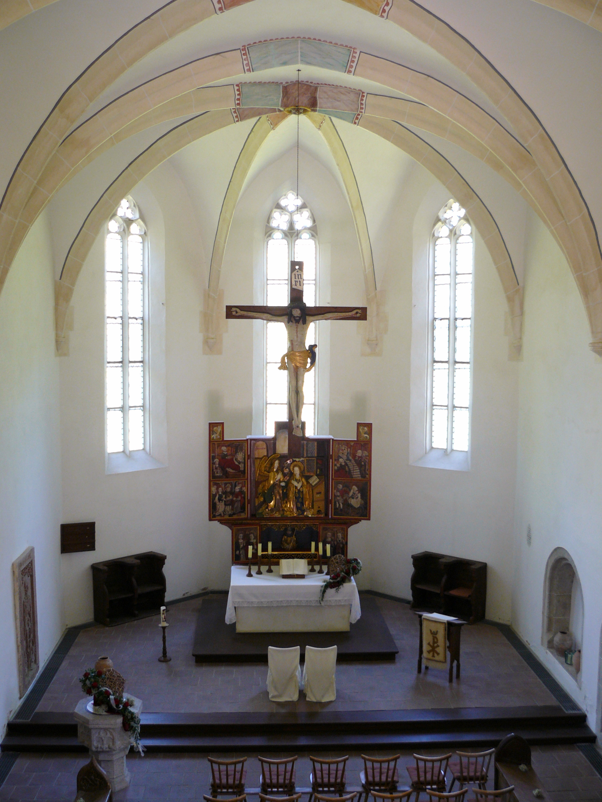 Chorraum der Klosterkirche Christgarten